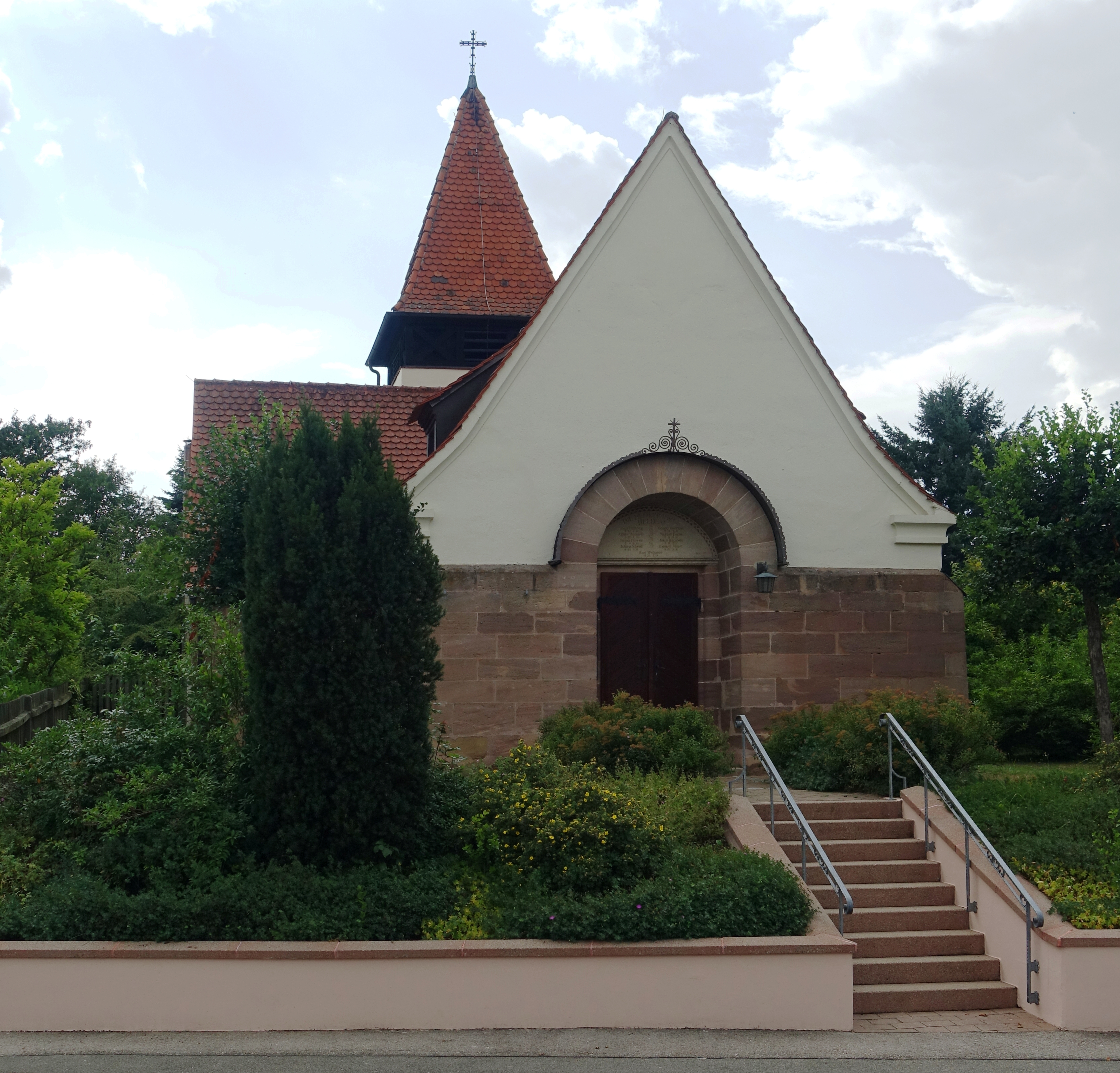 nicht mehr genutzte Filialkirche